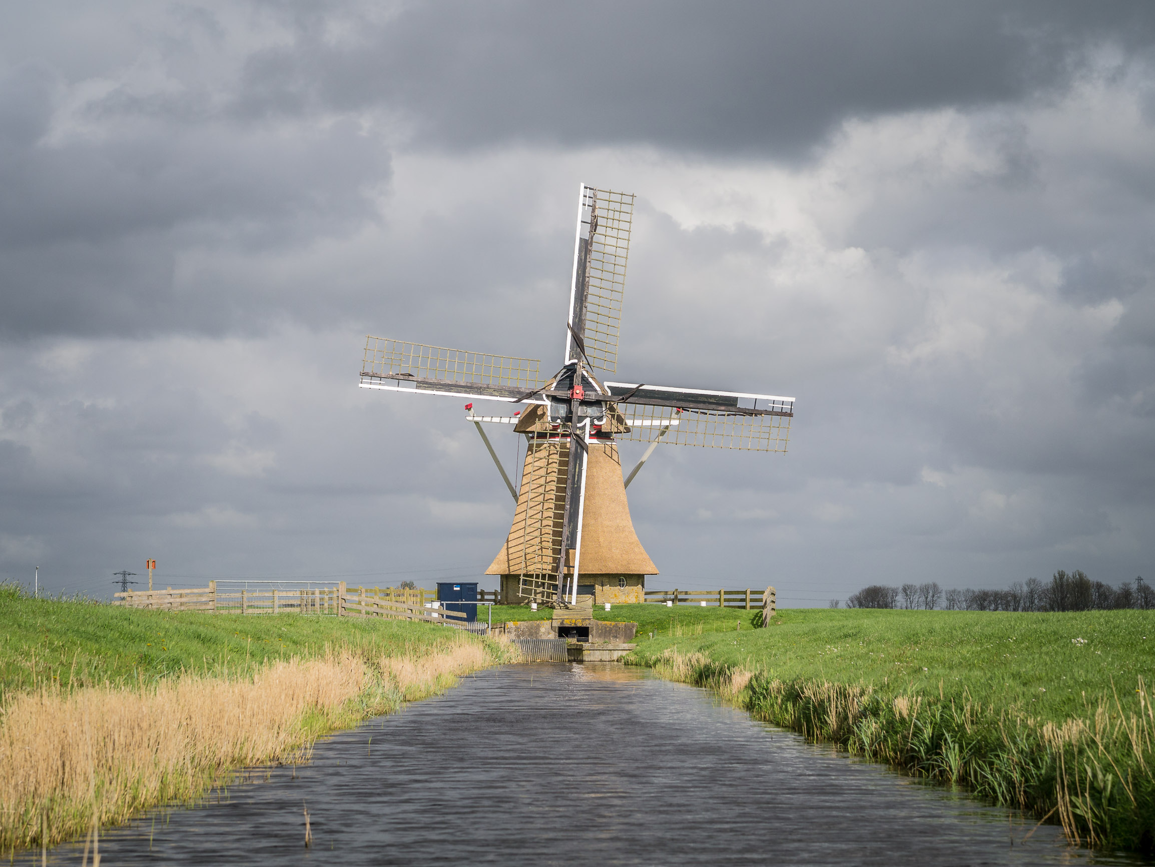 Klaarkampstermolen, Rinsumageest